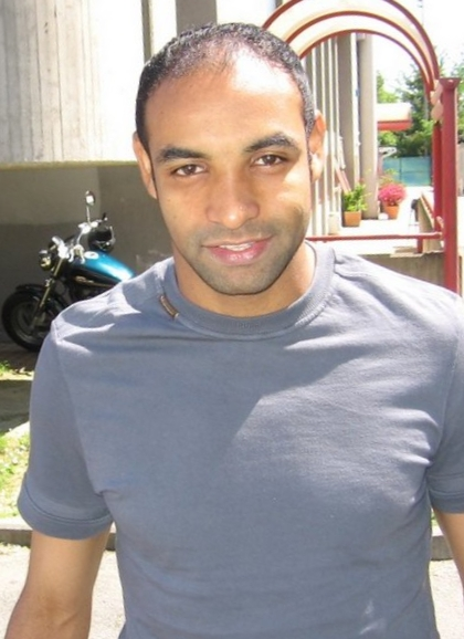 Emerson Ferreira da Rosa